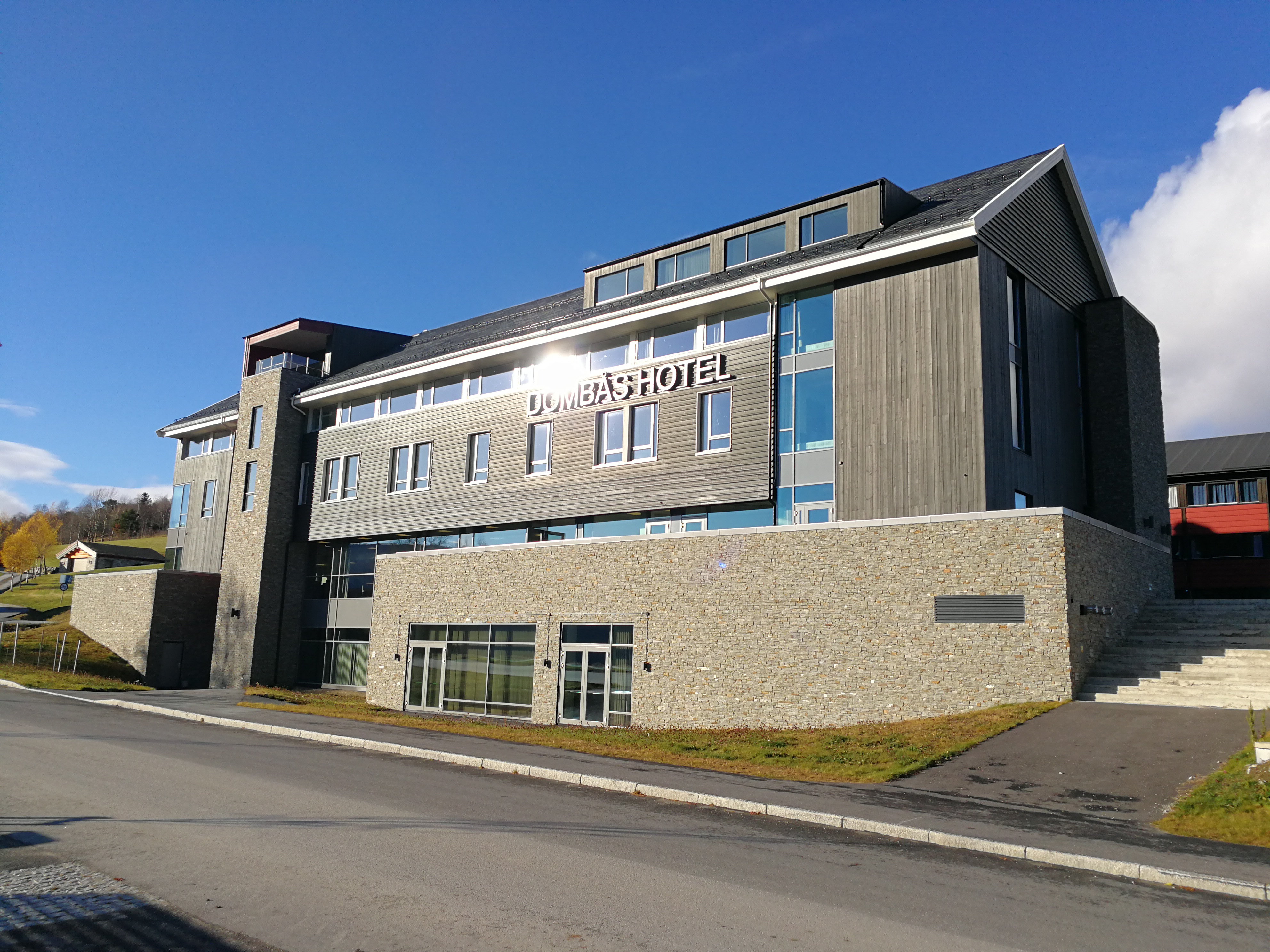 Fasaden til nybygget som ble bygget i 2014. Foto: Sjur-Magnus Aaboen